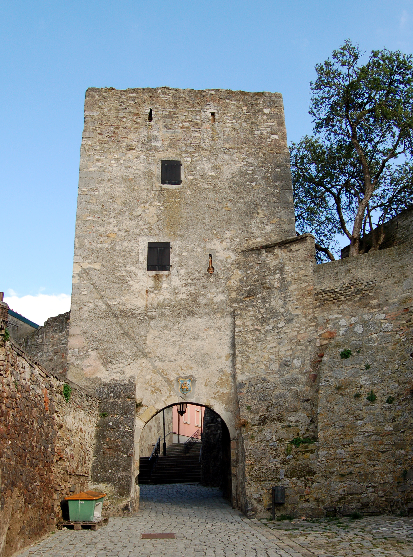 Das Fischertor in Hainburg an der Donau in Niederösterreich